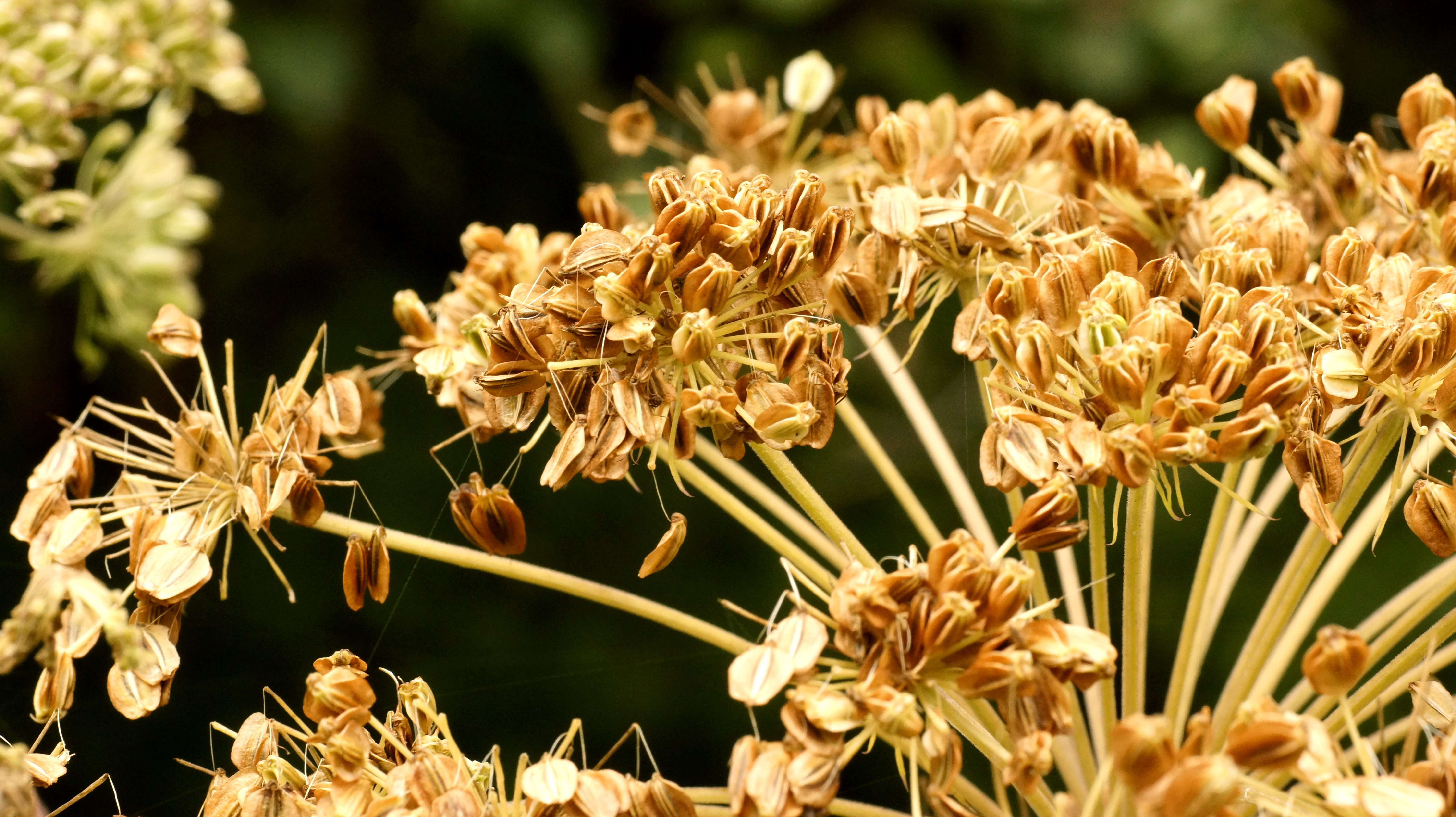 Wald-Engelwurz, Apiaceae, Deutschland, Bayern, Oberfranken, Selbitz Photo: U.Schmidt, VIII.2012